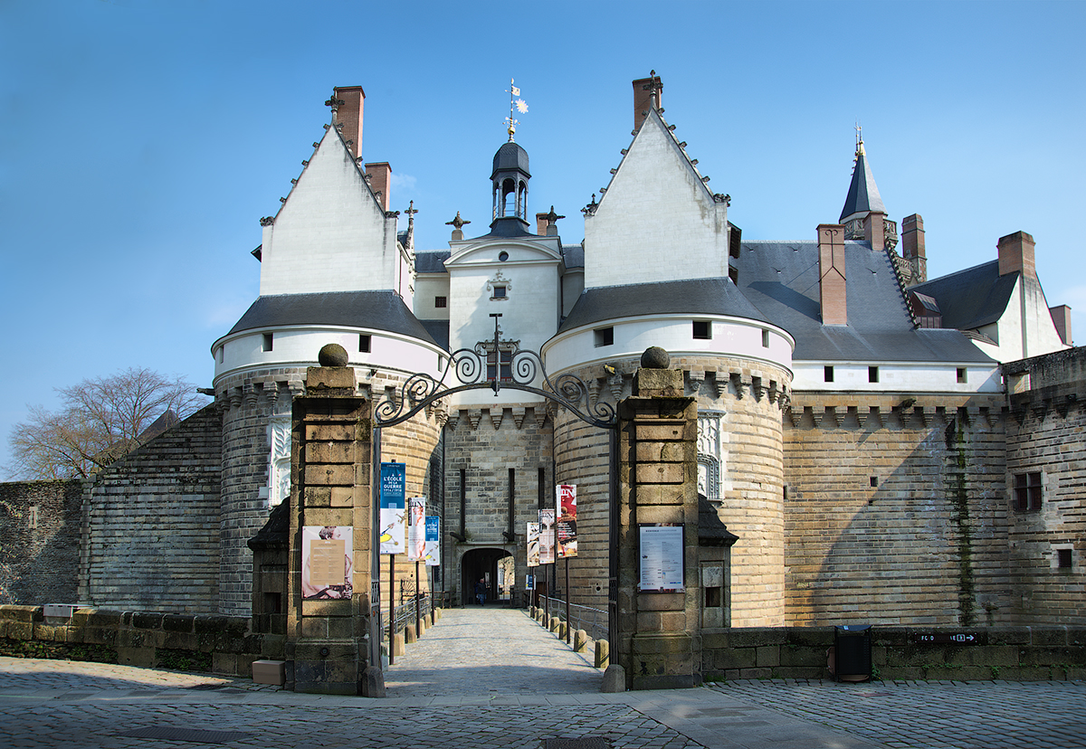 4 Place Marc Elder à Nantes